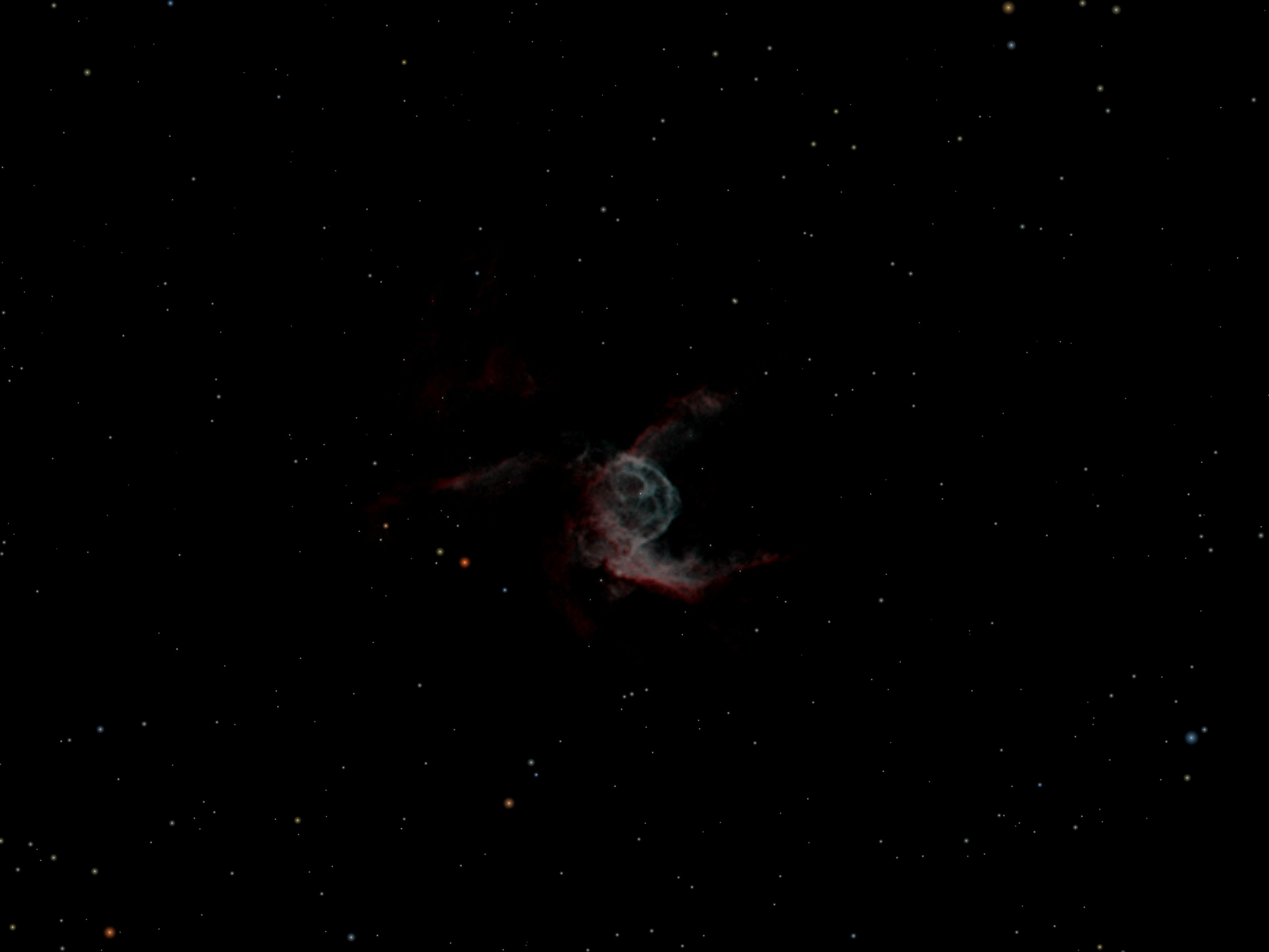 NGC 2359